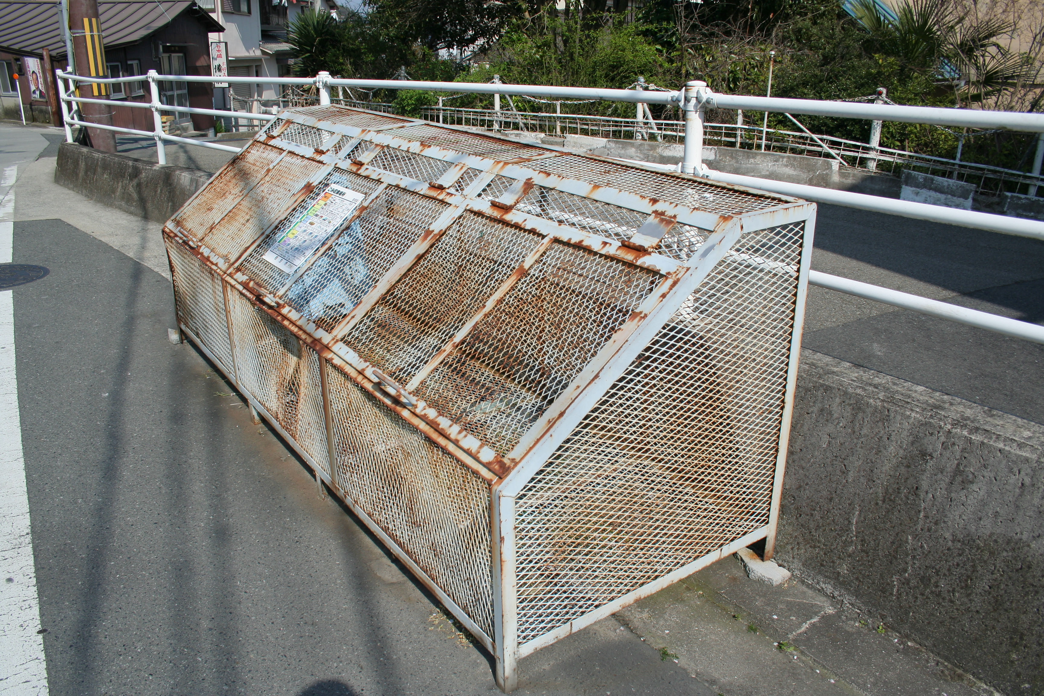 日本の住宅地などにある大型のゴミ箱。